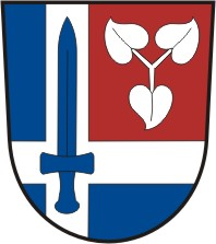 Paračov